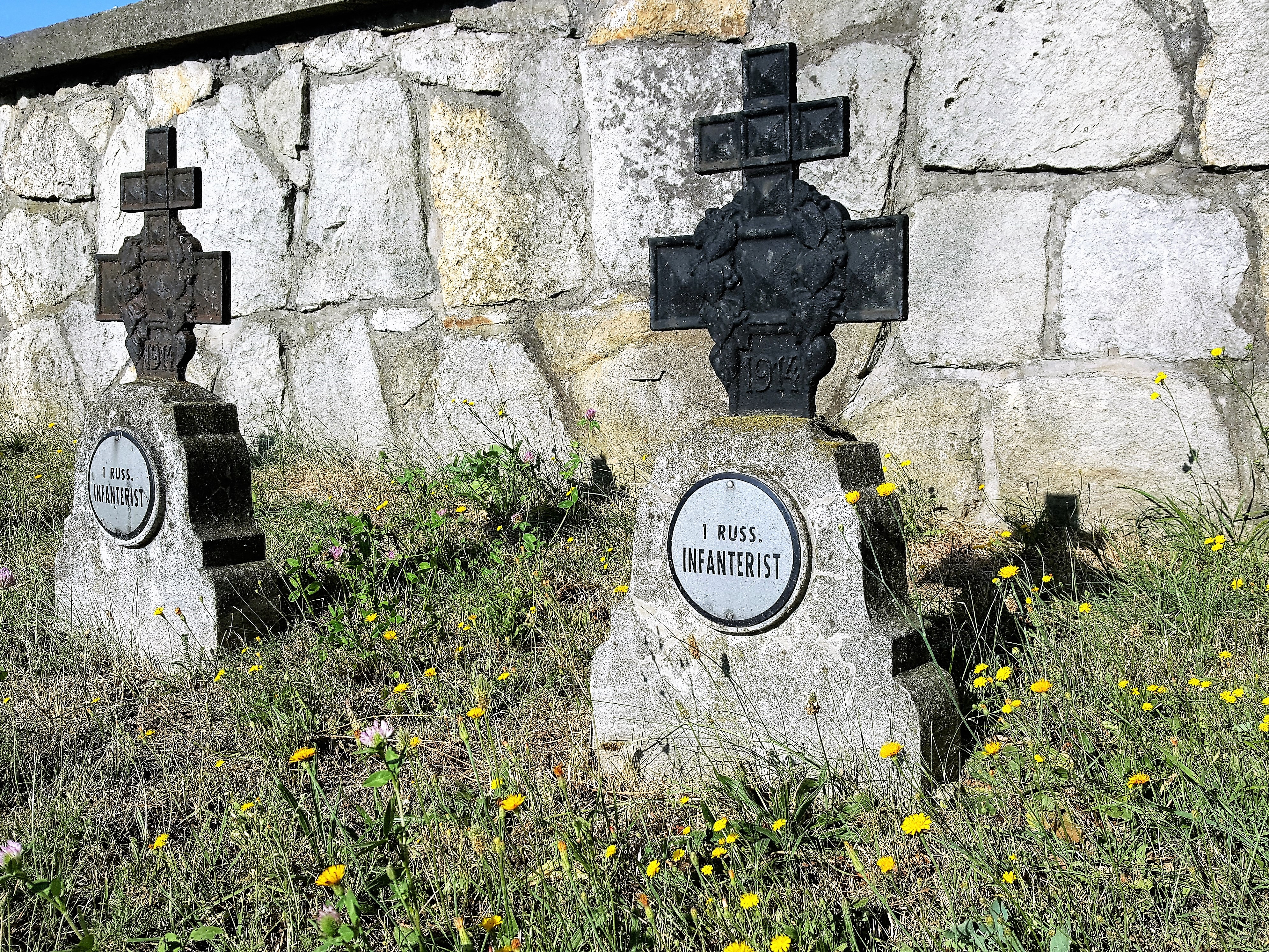 Cmentarz wojenny nr 180 w Tarnowcu. Nagrobki.